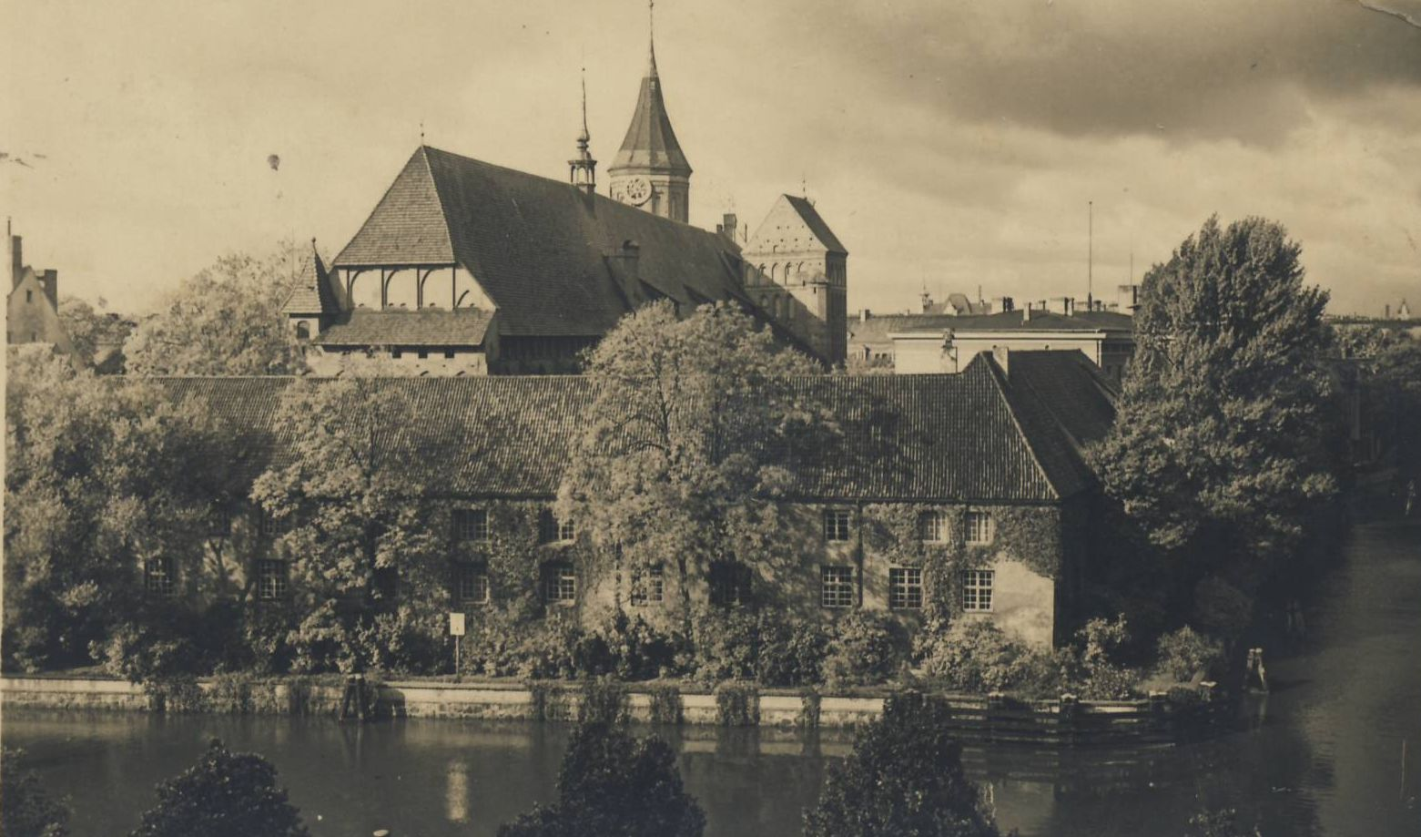 Die alte Universität Königsberg mit dem Dom auf dem Kneiphof